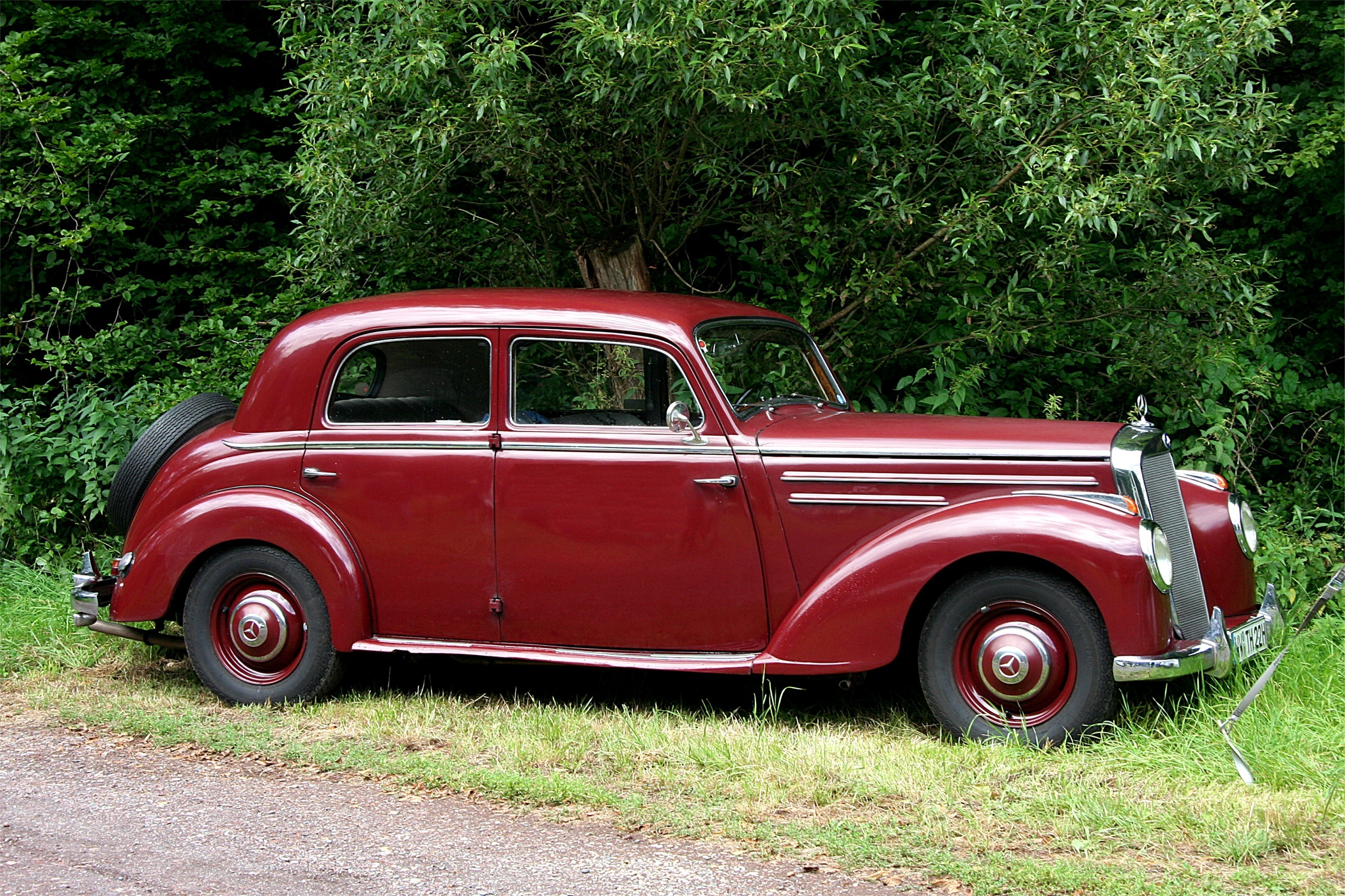 Mercedes-Benz 220, Bauzeit 1951–1954